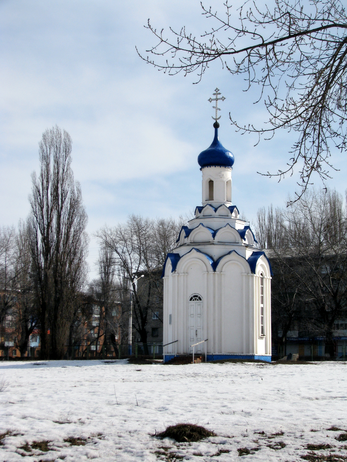 Часовня в память об усопших